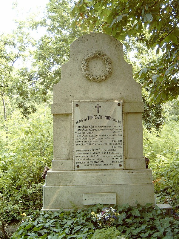 Tomcsányi Móric (Temesvár, 1878. március 21. – Budapest, 1951. június 12.) jogász, egyetemi tanár és testvére Tomcsányi Vilmos Pál (Budapest, 1880. február 8. – Budapest, 1959. május 7.) jogász, földbirtokos, miniszter sírja Budapesten. Kerepesi temető: 25-1-1.